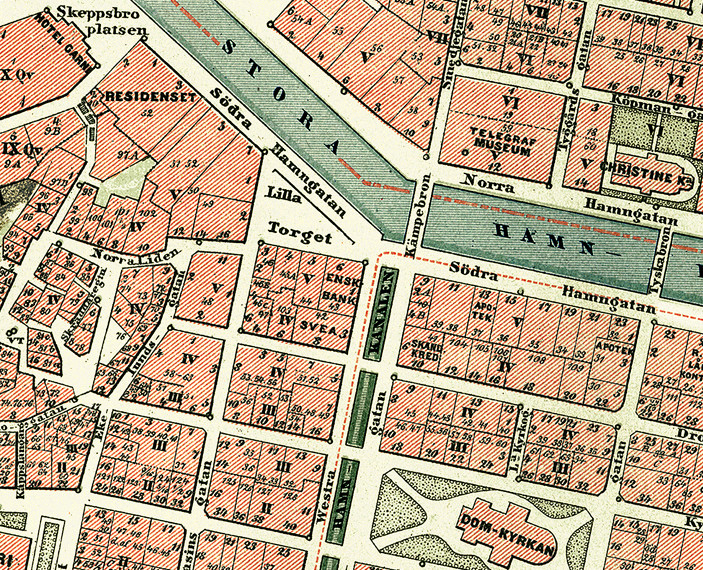 Bilden visar kvarteret Alströmer i stadsdelen Inom Vallgraven i Göteborg år 1888. Kvarteret syns i mitten av kartan, söder om Lilla Torget, och omges av Lilla Torget, Västra Hamngatan, Drottninggatan och Magasinsgatan. I kvarteret ligger Sveahuset.